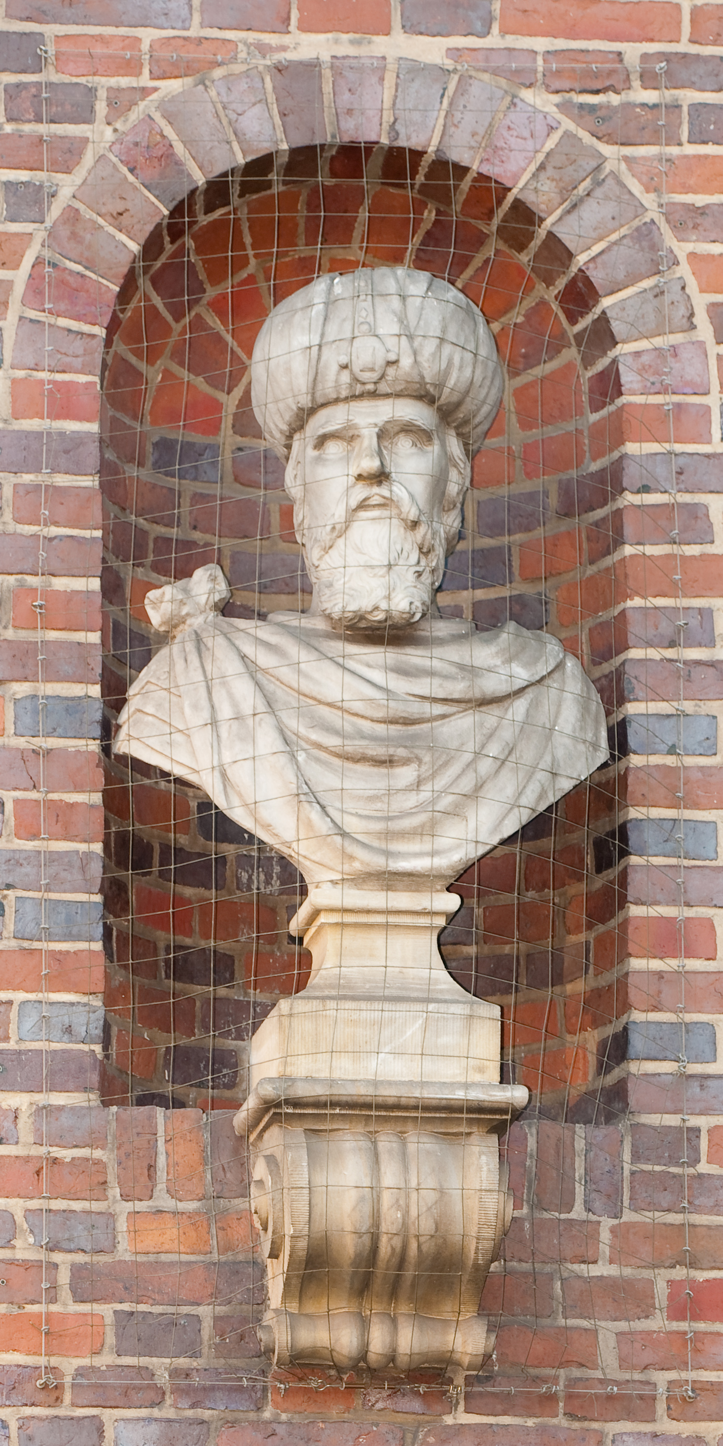 Eine von 4 "Weltherrscher"-Büsten, die ursprünglich die Fassade eines Hauses in der Düsternstraße verzierten und nach dessen Abbruch 1906 an das MHG gingen.Die Büste "Cyrus" ist die zweite von links vom Betrachter aus gesehen.